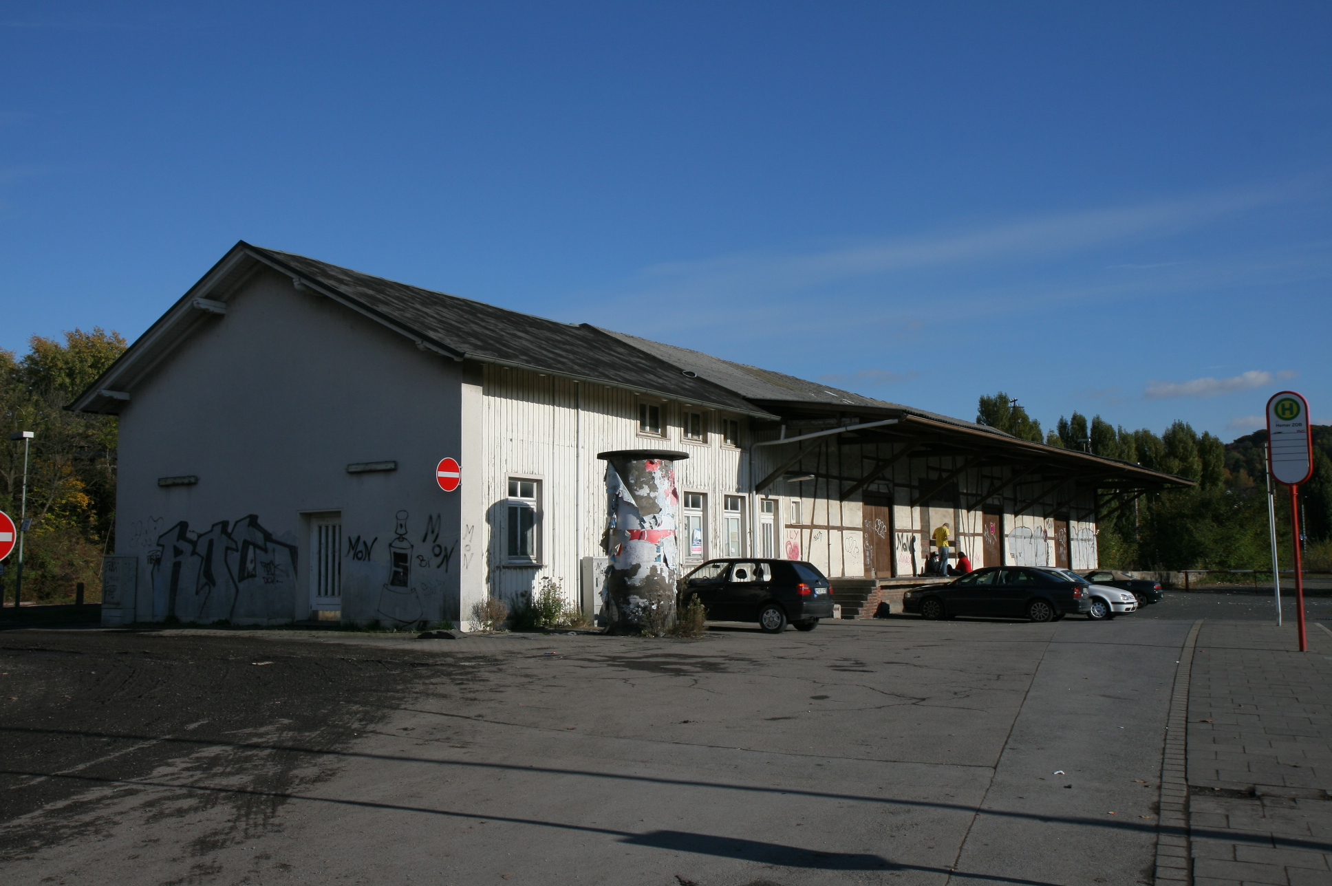 Ehemalige Güterabfertigung des Bahnhofs Hemer.